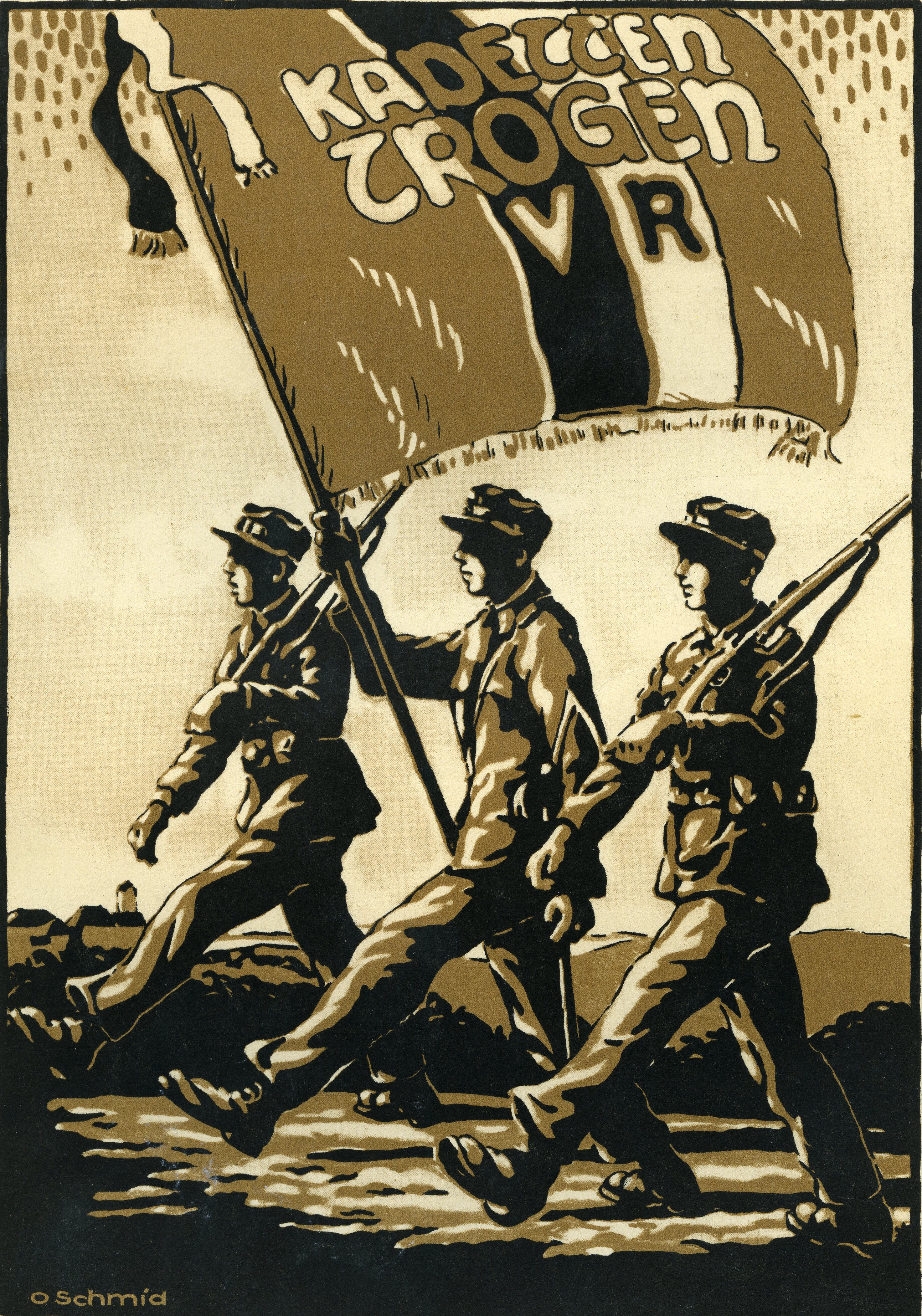 Titelbild der KVT-Mitteilungen Nr. 6 (1927): Kadetten. Linolschnitt von Otto Schmid (1889 - 1974)